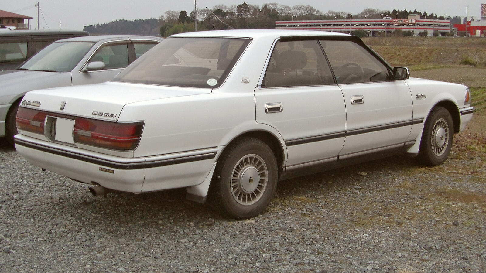 トヨタ・クラウン（S130型ハードトップ）